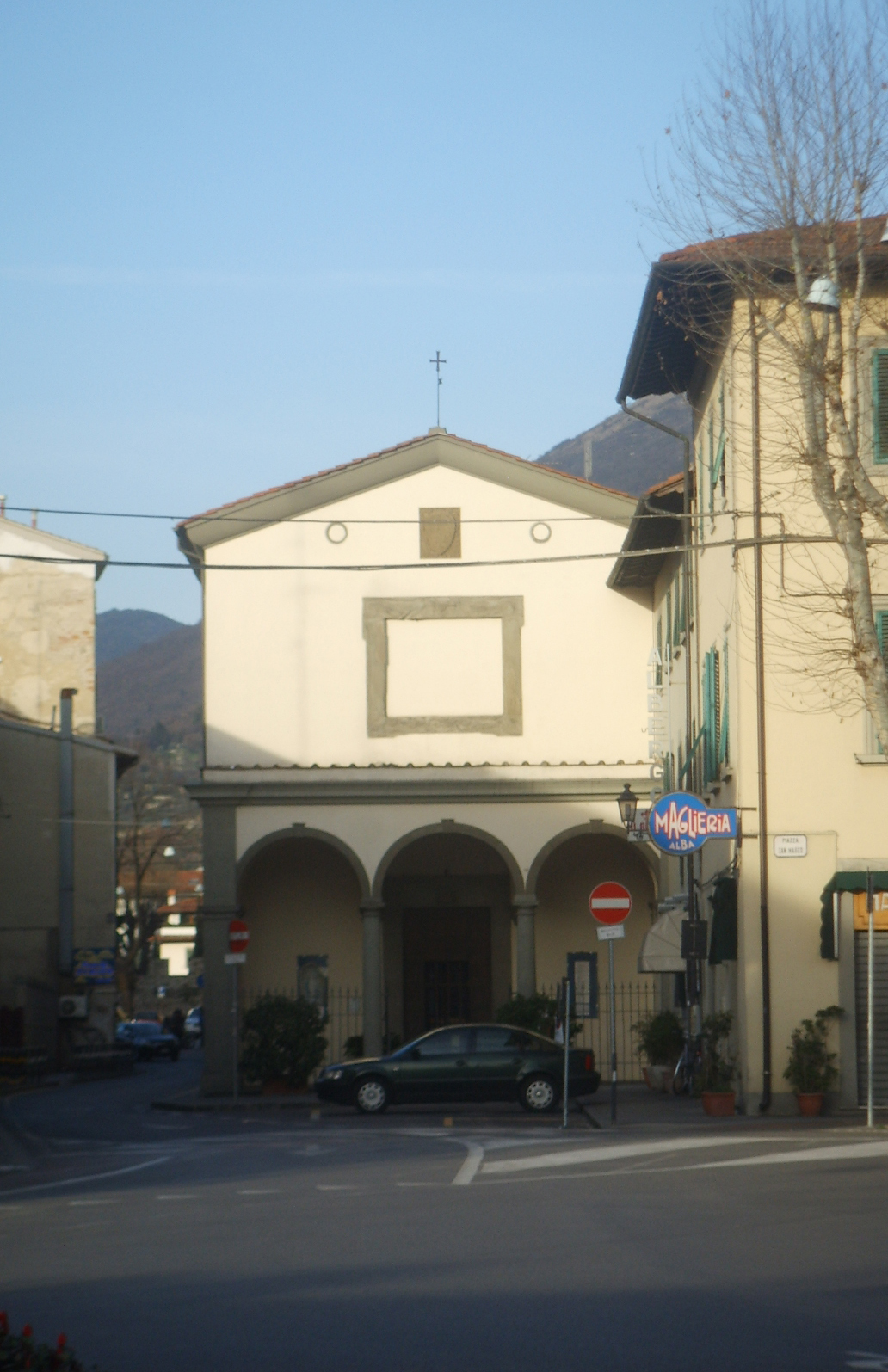 Santa Maria del Giglio (Prato).